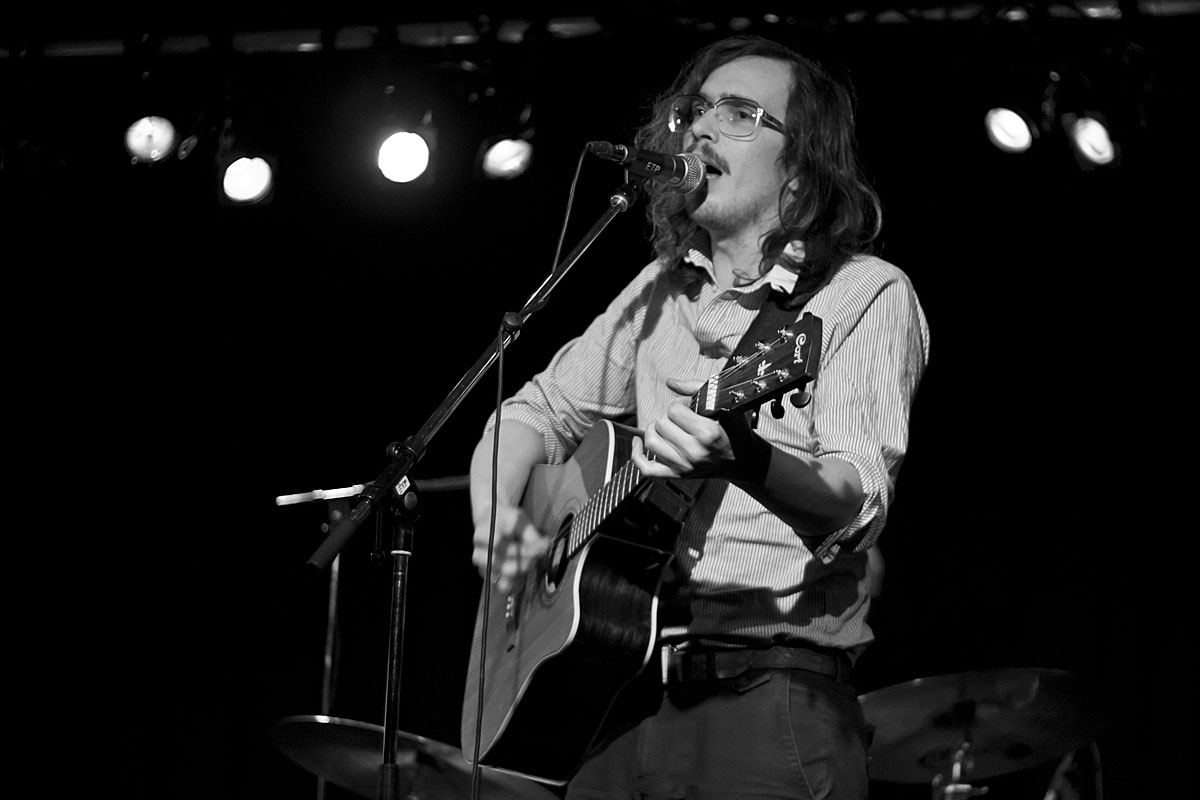 Kristian Leth ved en koncert på Kulturstationen i Vanløse 16. november 2012